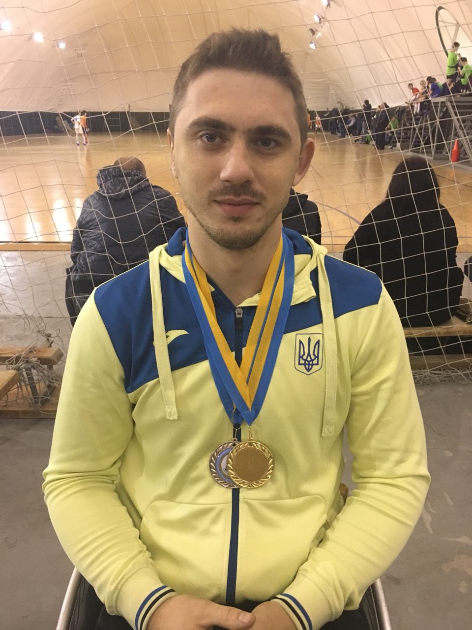 Київ, 2017 р.